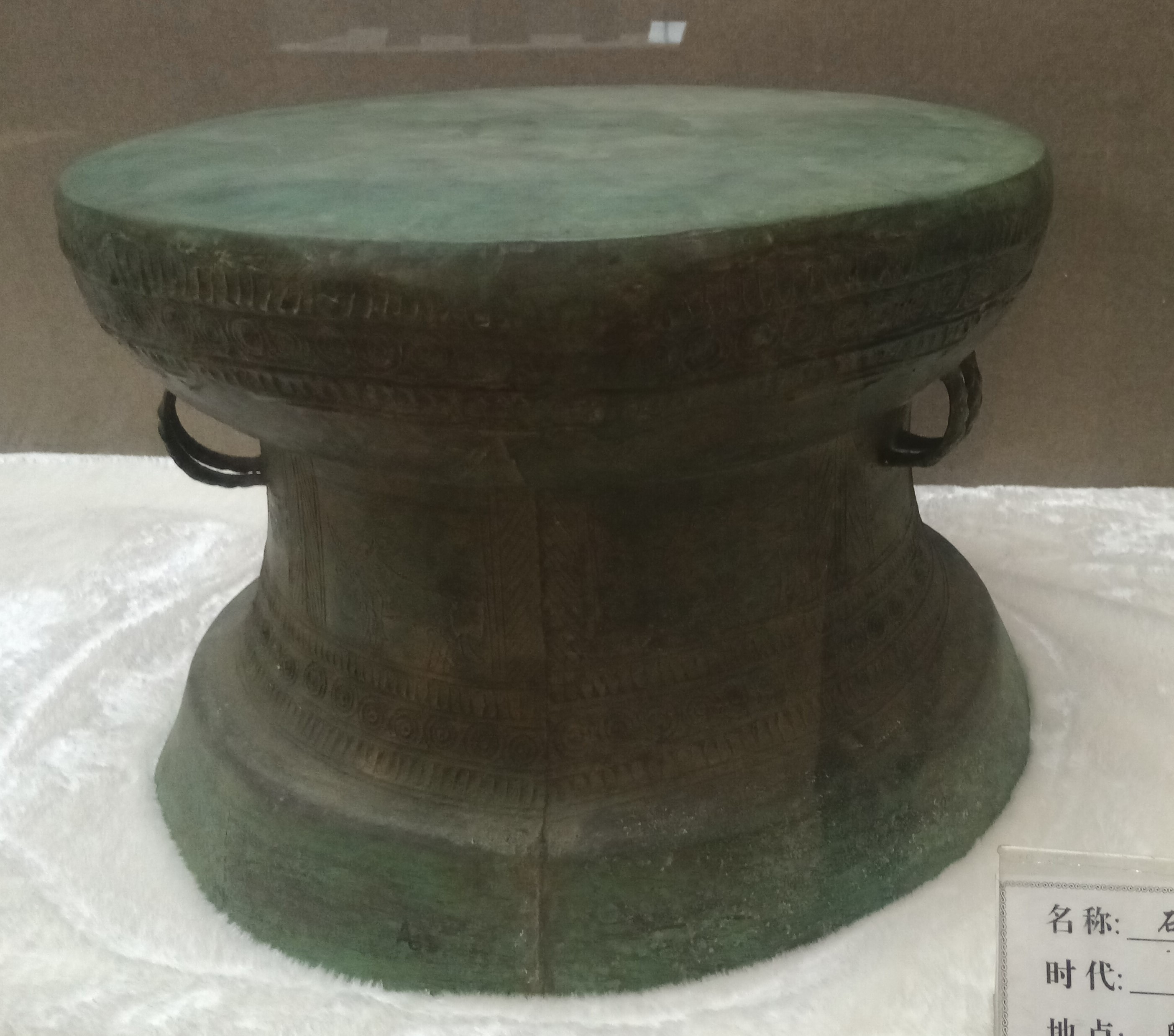 中文（中国大陆）: 保山市博物馆-西汉-腾冲猴桥-石寨山型铜鼓